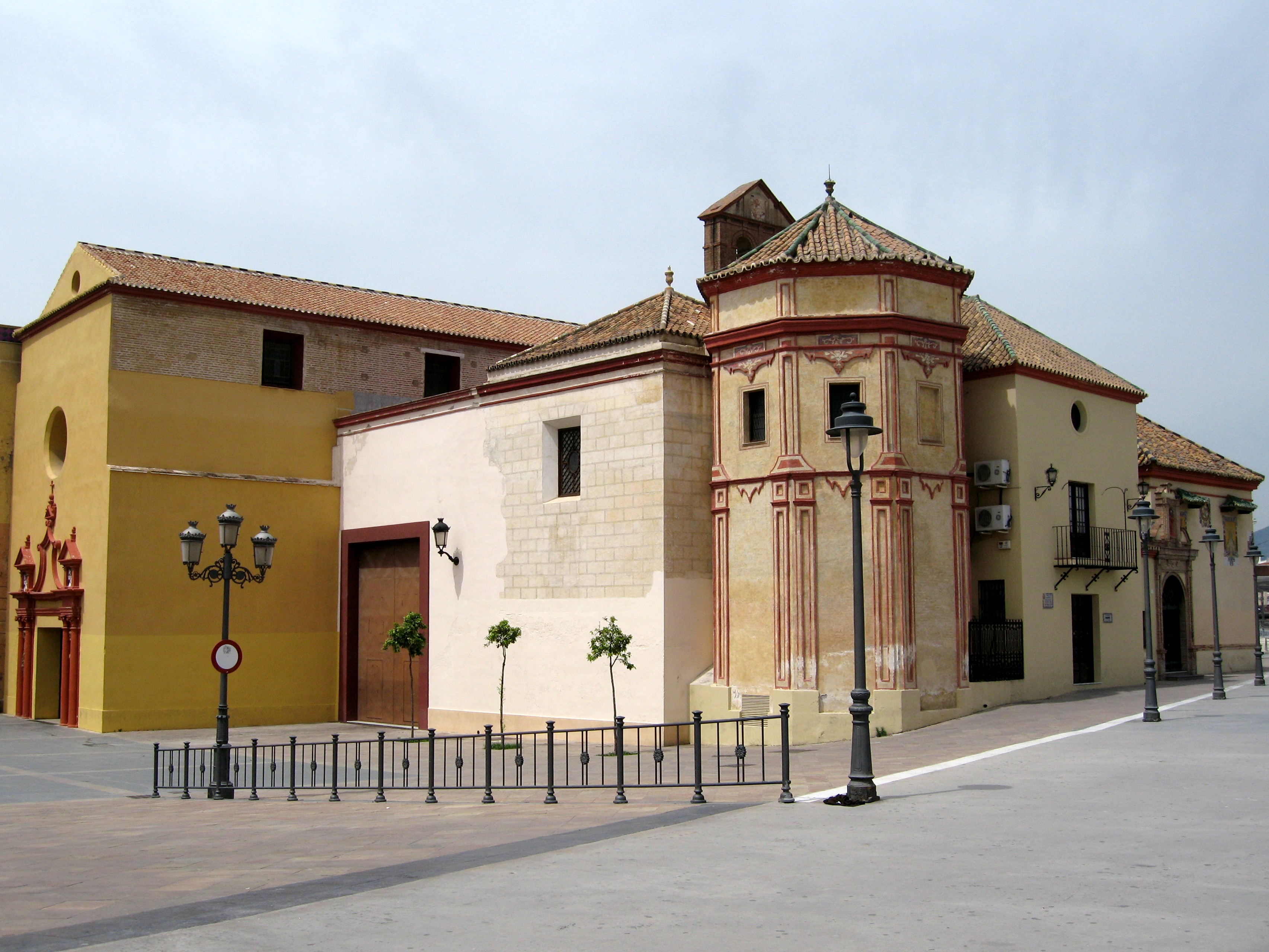 Kirche Santo Domingo am Ufer des Río Guadalmedina in Málaga, Andalusien, Spanien